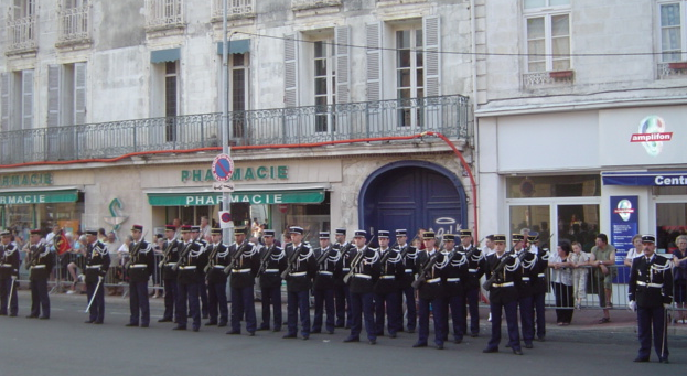 Préparation des sous-officiers de la gendarmerie de Rochefort durant la cérémonie du 14 juillet, avenue de Gaulle